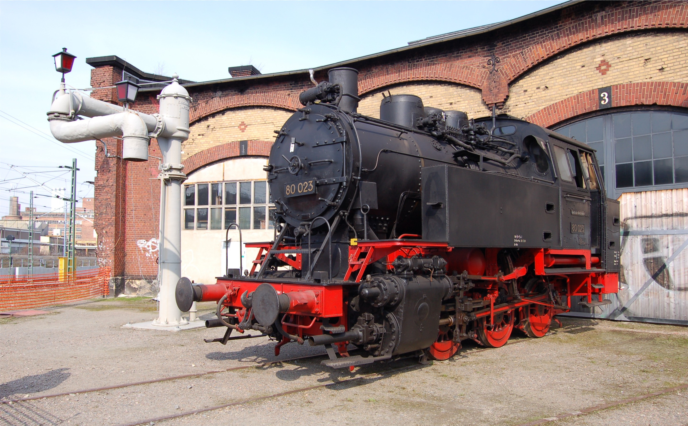 Dampflok 80 023 des Verkehrsmuseums Dresden im Bw Dresden-Altstadt.